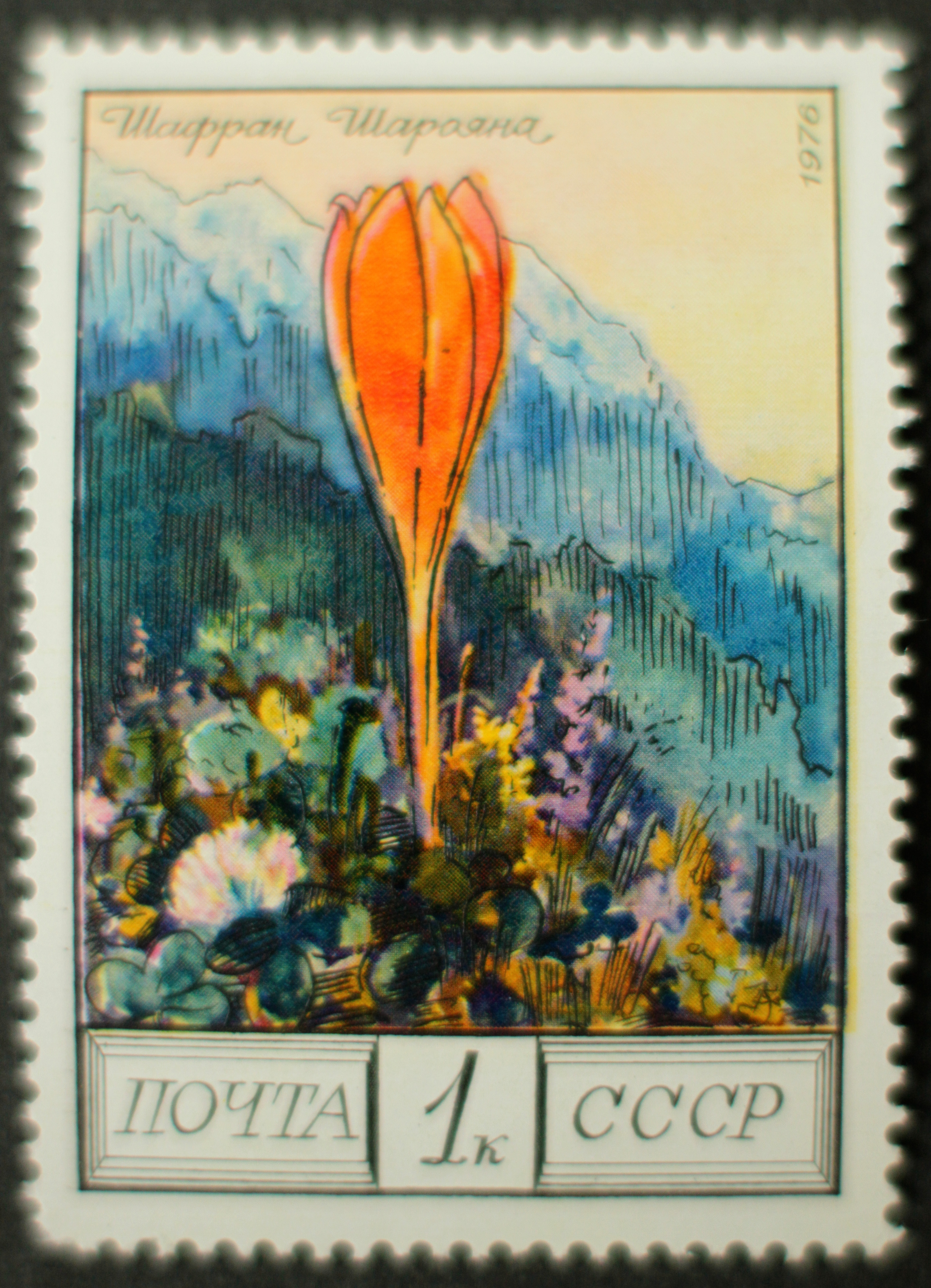 Briefmarke, Sowjetunion